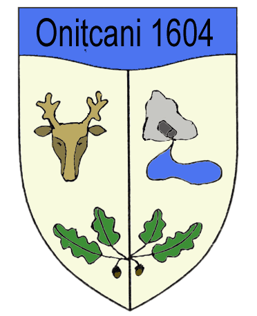 Герб села Оницканы